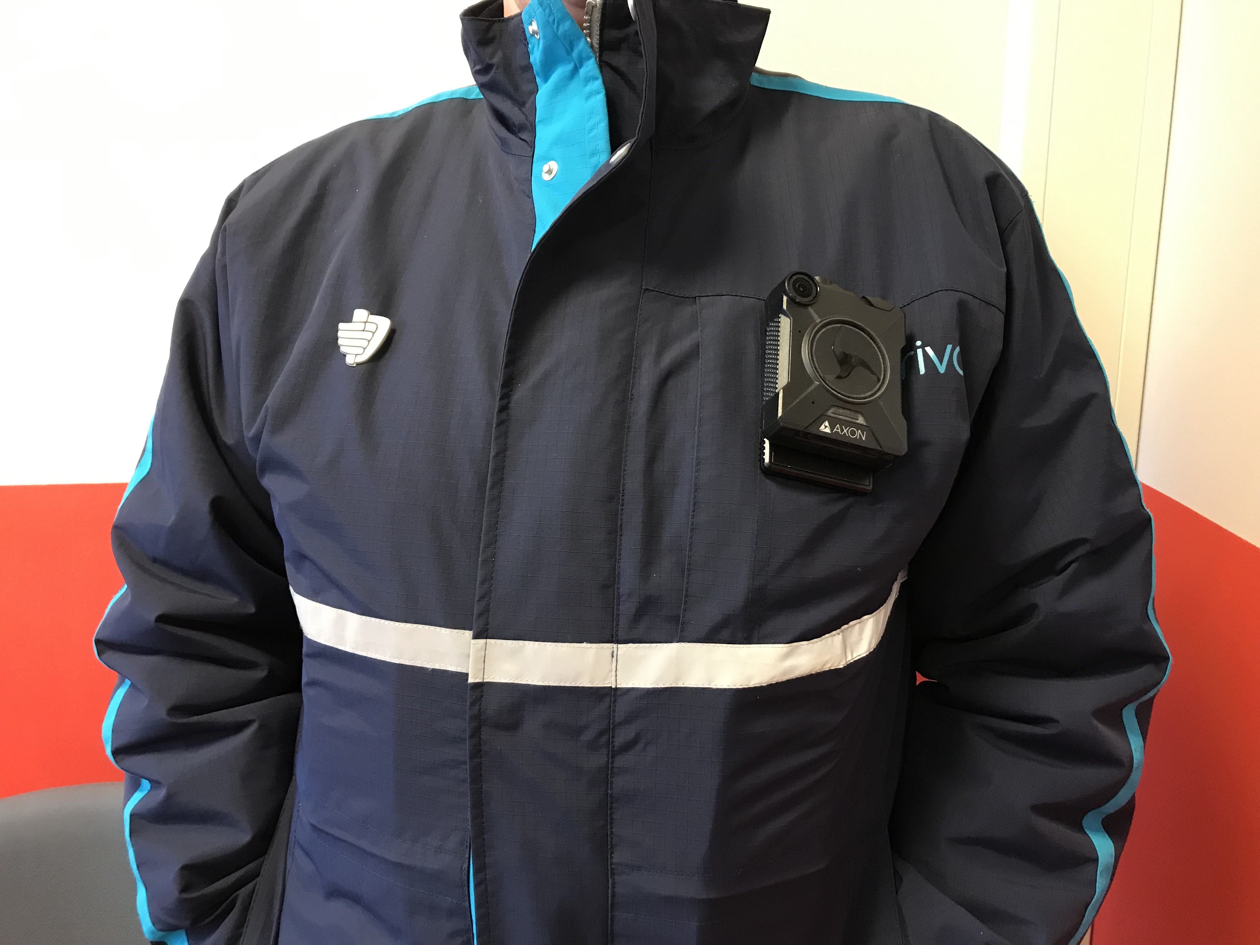 Steward van Arriva op de trein in Noord Nederland met een bodycam op het uniform